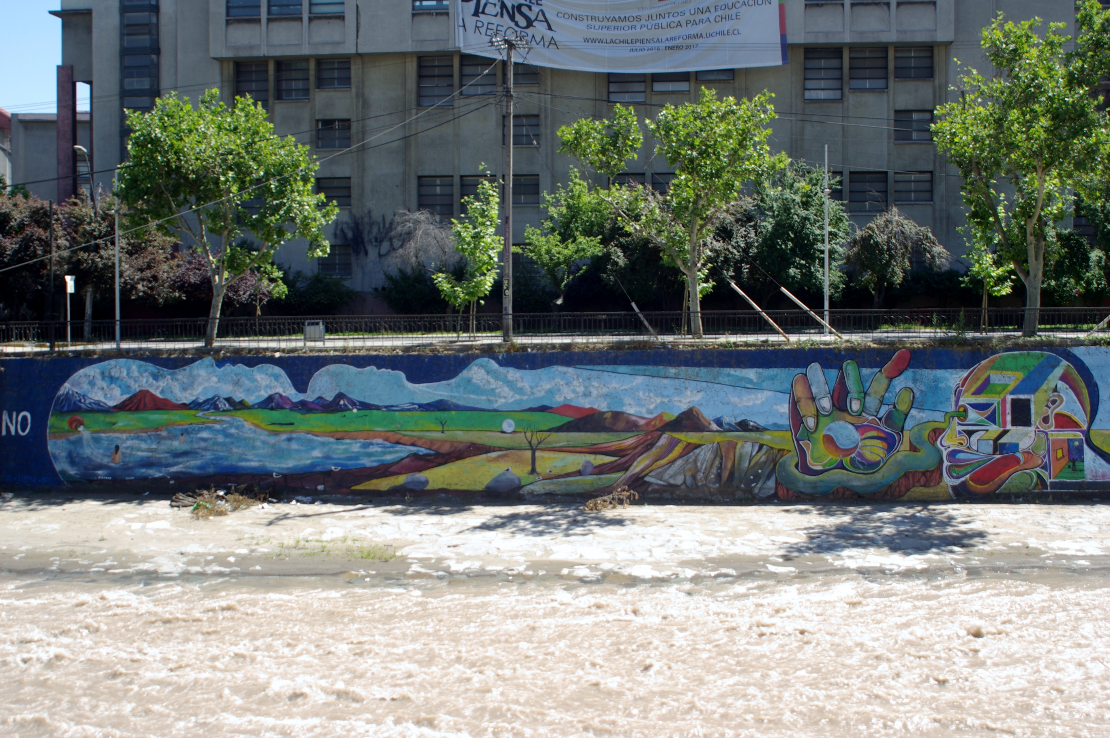 Grafiti realizado por Moreno Villa (Agotok), 2016. Ribera norte del río Mapocho, al este del puente Pío Nono, a la altura de la Escuela de Derecho de la Universidad de Chile.